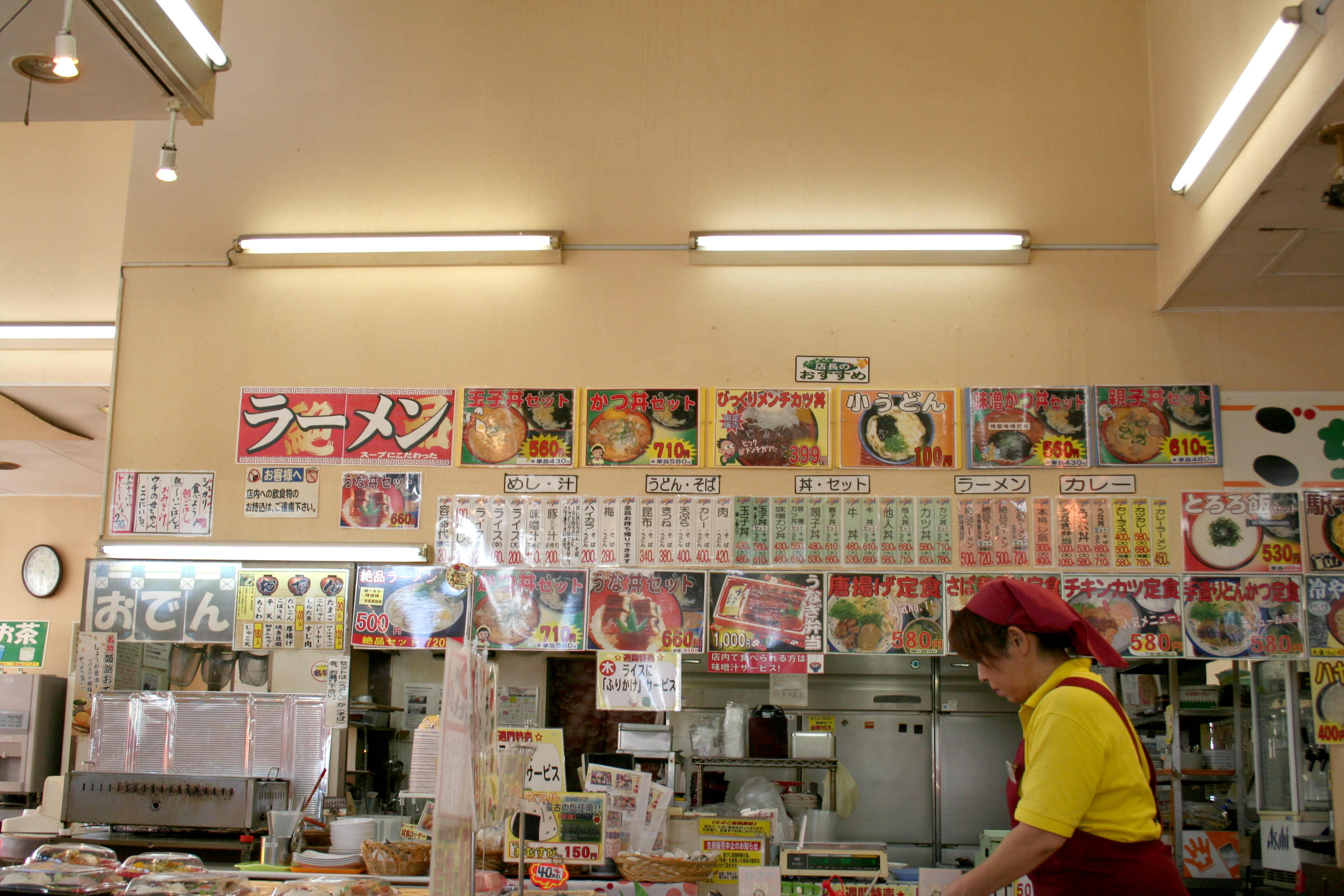 たいこ弁当の店内の様子。